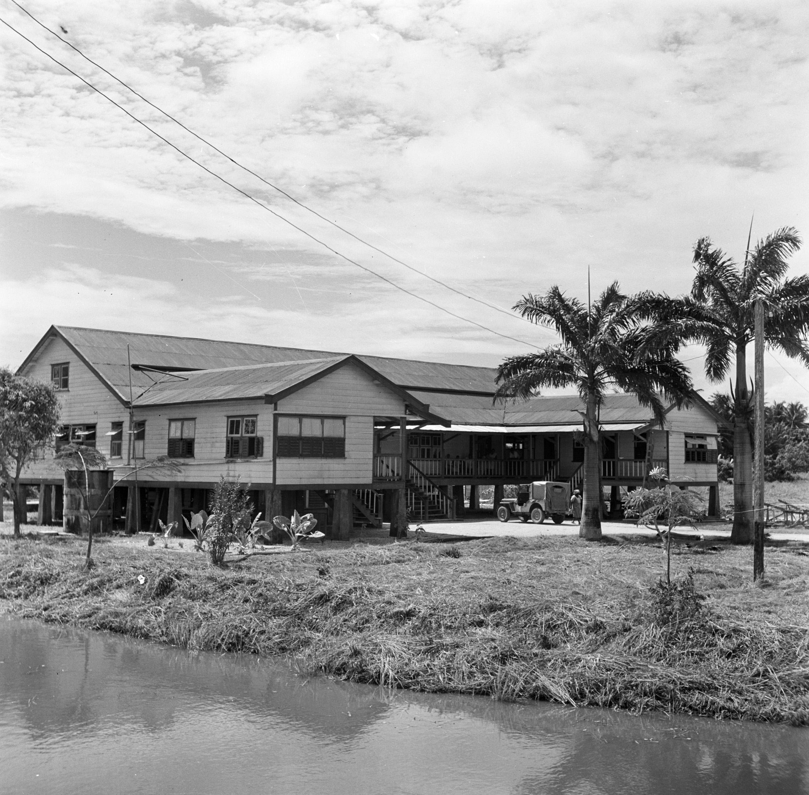 Collectie / Archief : Fotocollectie Van de Poll Reportage / Serie : Reis naar Suriname en de Nederlandse Antillen Beschrijving : Het districtsziekenhuis in Nieuw-Nickerie Datum : oktober 1947 Locatie : Nickerie, Suriname Trefwoorden : ziekenhuizen Fotograaf : Poll, Willem van de Auteursrechthebbende : Nationaal Archief Materiaalsoort : Negatief (zwart/wit) Nummer archiefinventaris : bekijk toegang 2.24.14.02 Bestanddeelnummer : 252-5443